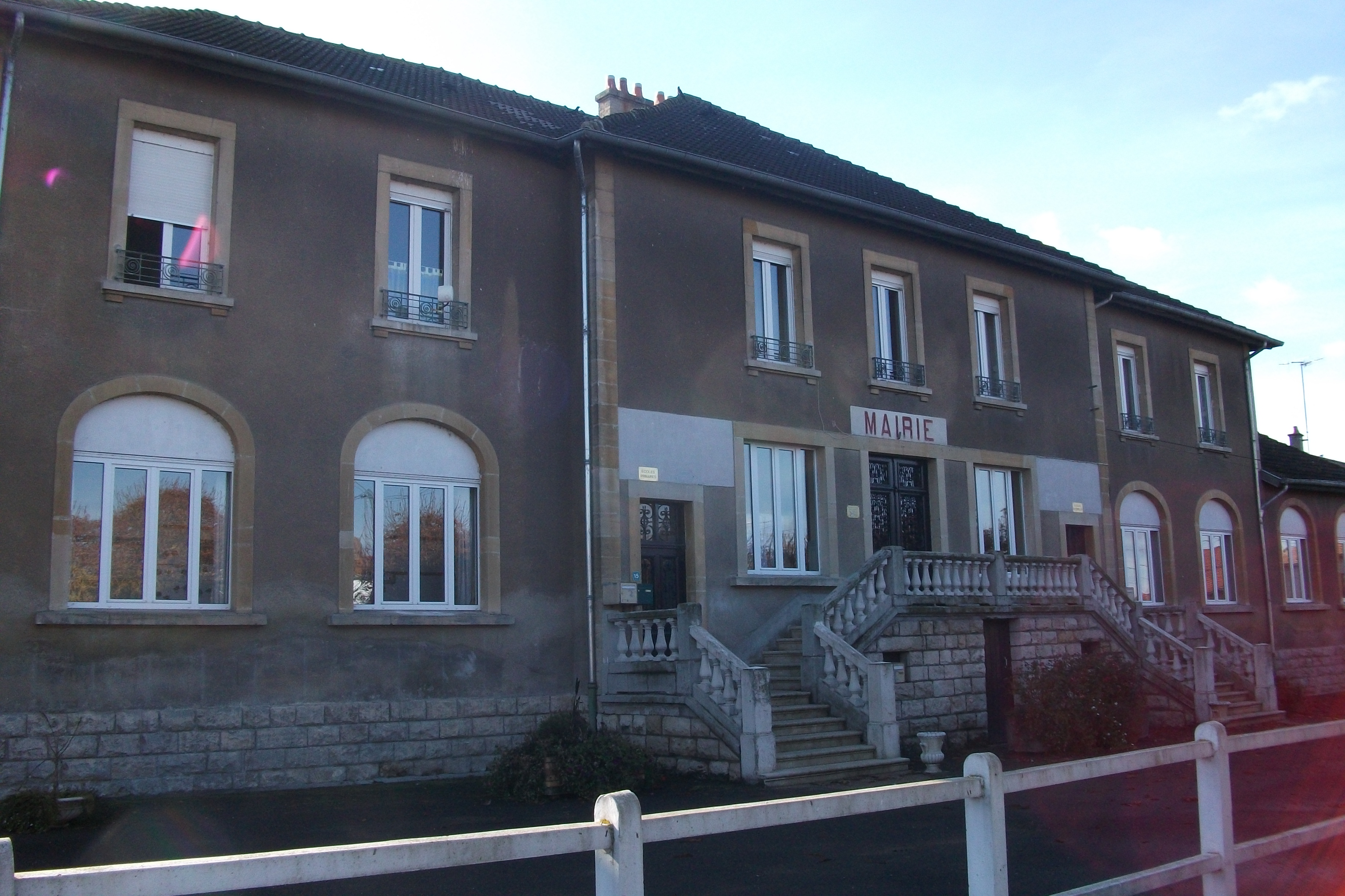 Buzy-Darmont l'école_et la mairie.